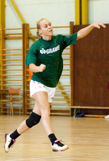 Kovacsicz Mónika válogatott magyar kézilabdázó.